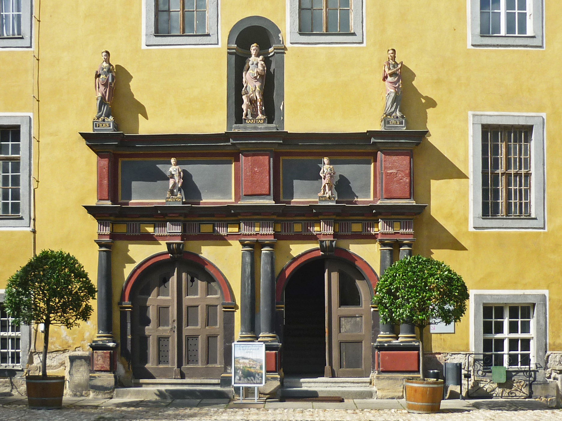 Renaissance-Portal auf der Heidecksburg in Rudolstadt in Thüringen